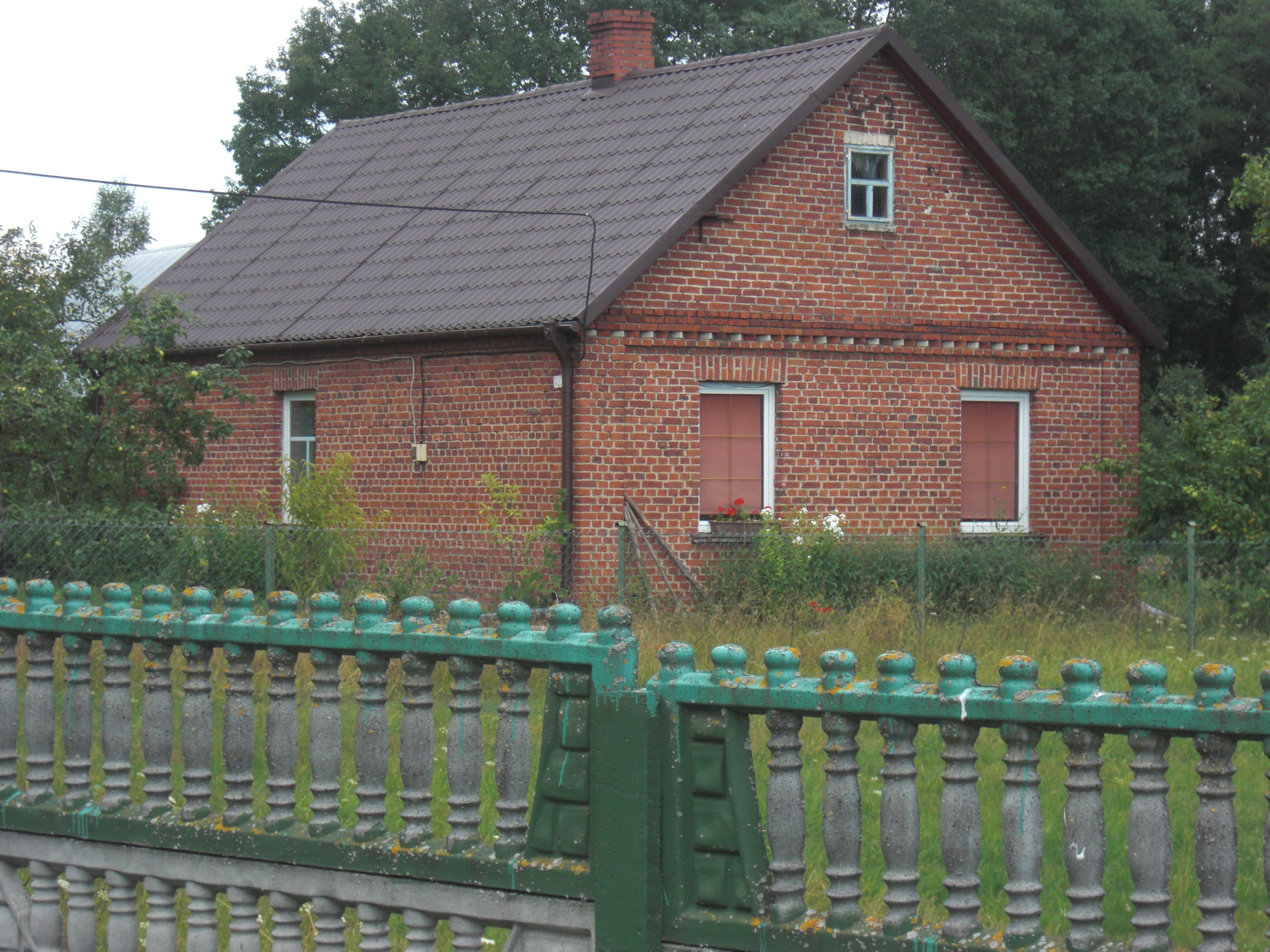 Wieś Grabowiec